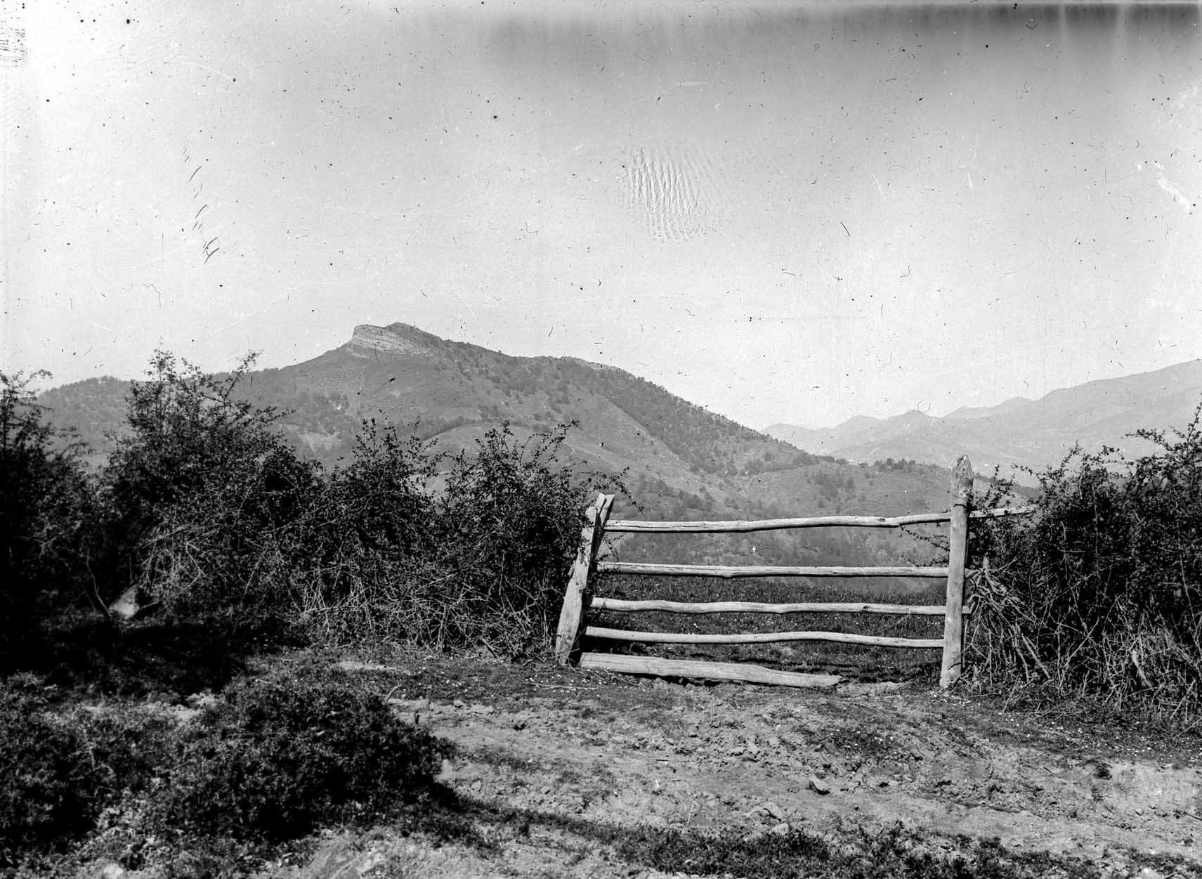 Egoarbitza mendia, Elgeta/Ermua/Zaldibar/Eibar herrien arteko mugan.